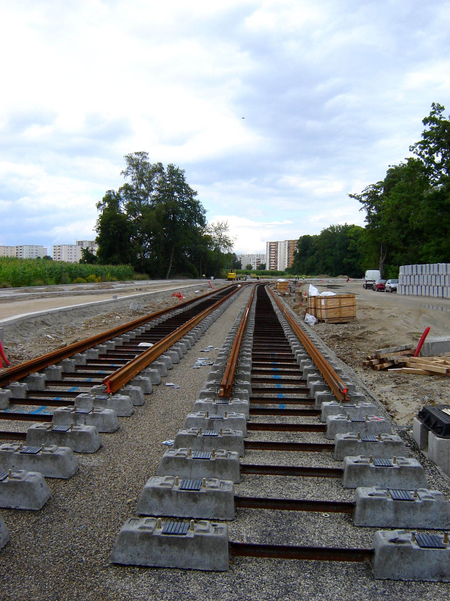 Chantier des extensions tram 2007 - 2008, en juin 2007